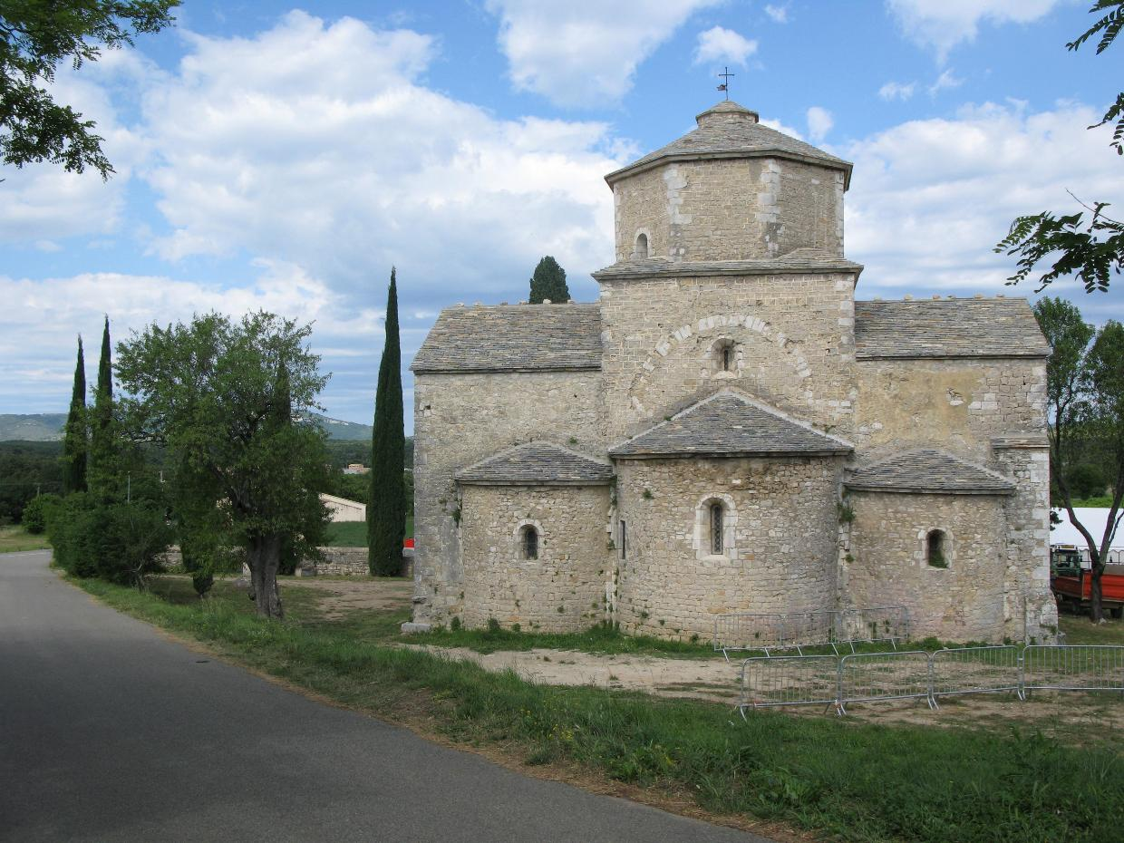 Village de Larnas (Ardèche)